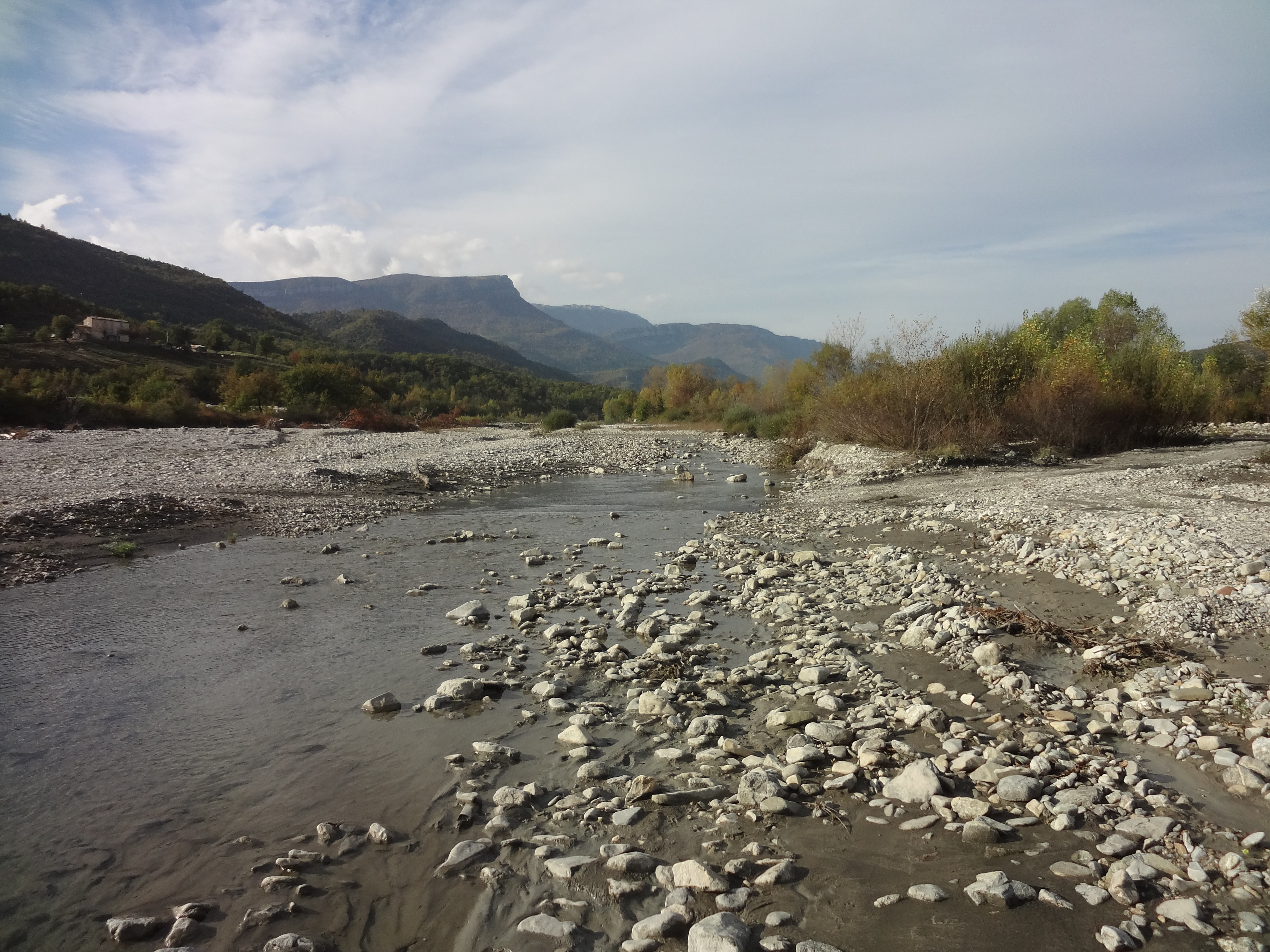 Gué traversant le Jabron à Bevons